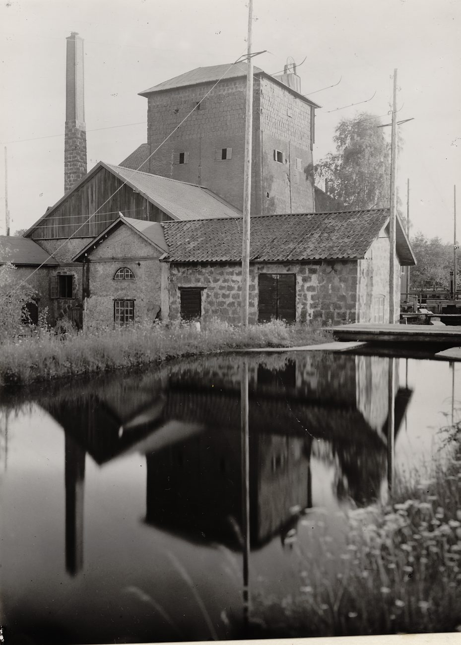 A3716. Långbanshyttan, Värmland.